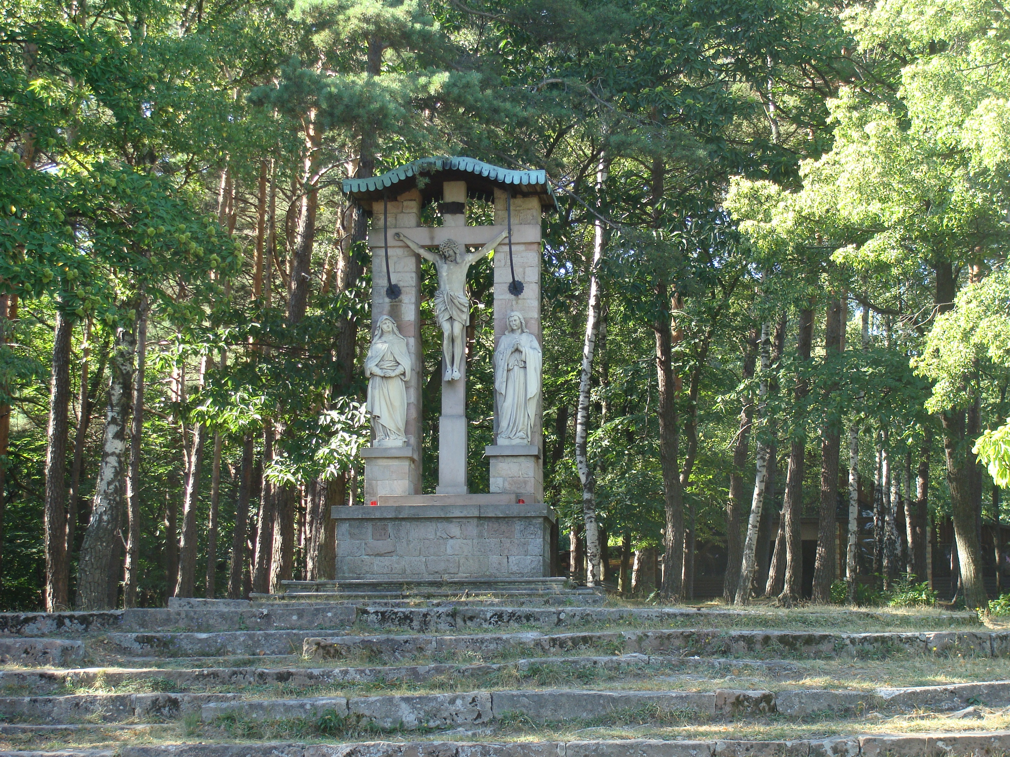 Außenaltar an der St. Anna-Kapelle bei Burrweiler